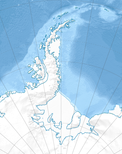 Antarktīdas pussalas reģiona karte atrašanās vietu veidnēm